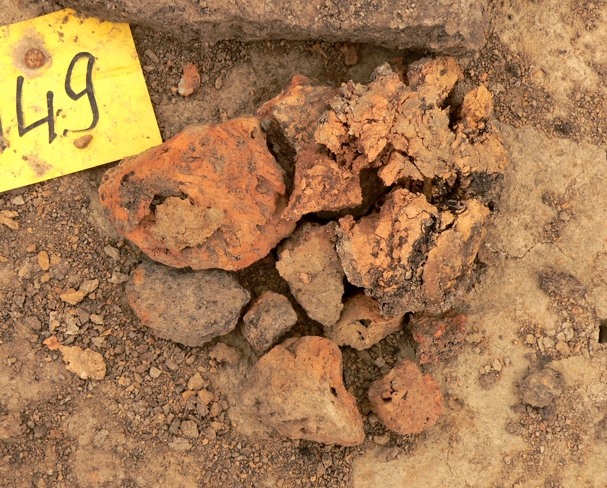 Bandkeramischer Fundplatz von Imbshausen und Eboldshausen Autobahn, Brandlehm